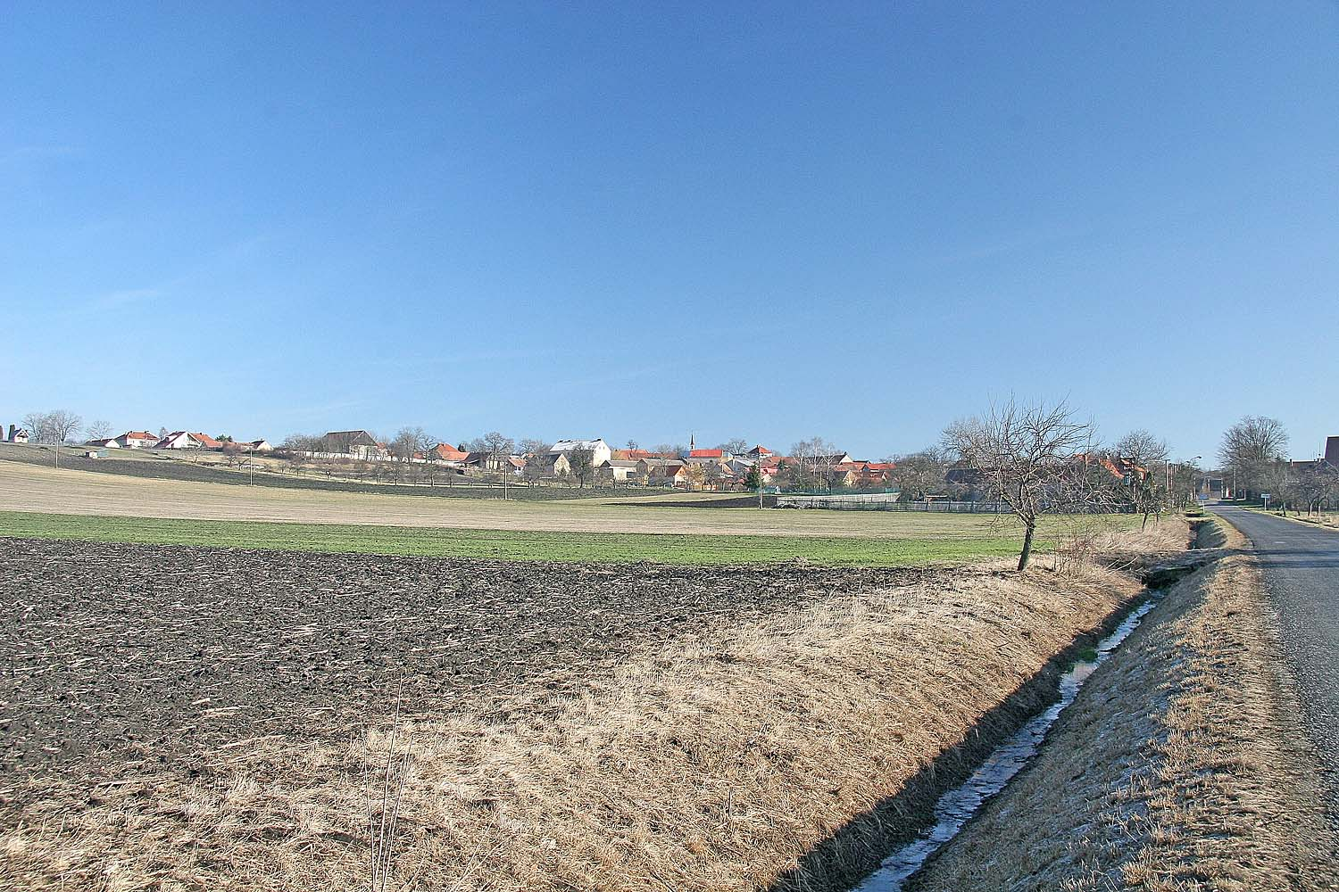 Opočnice, district Nymburk autor:Prazak date:17. 2. 2007